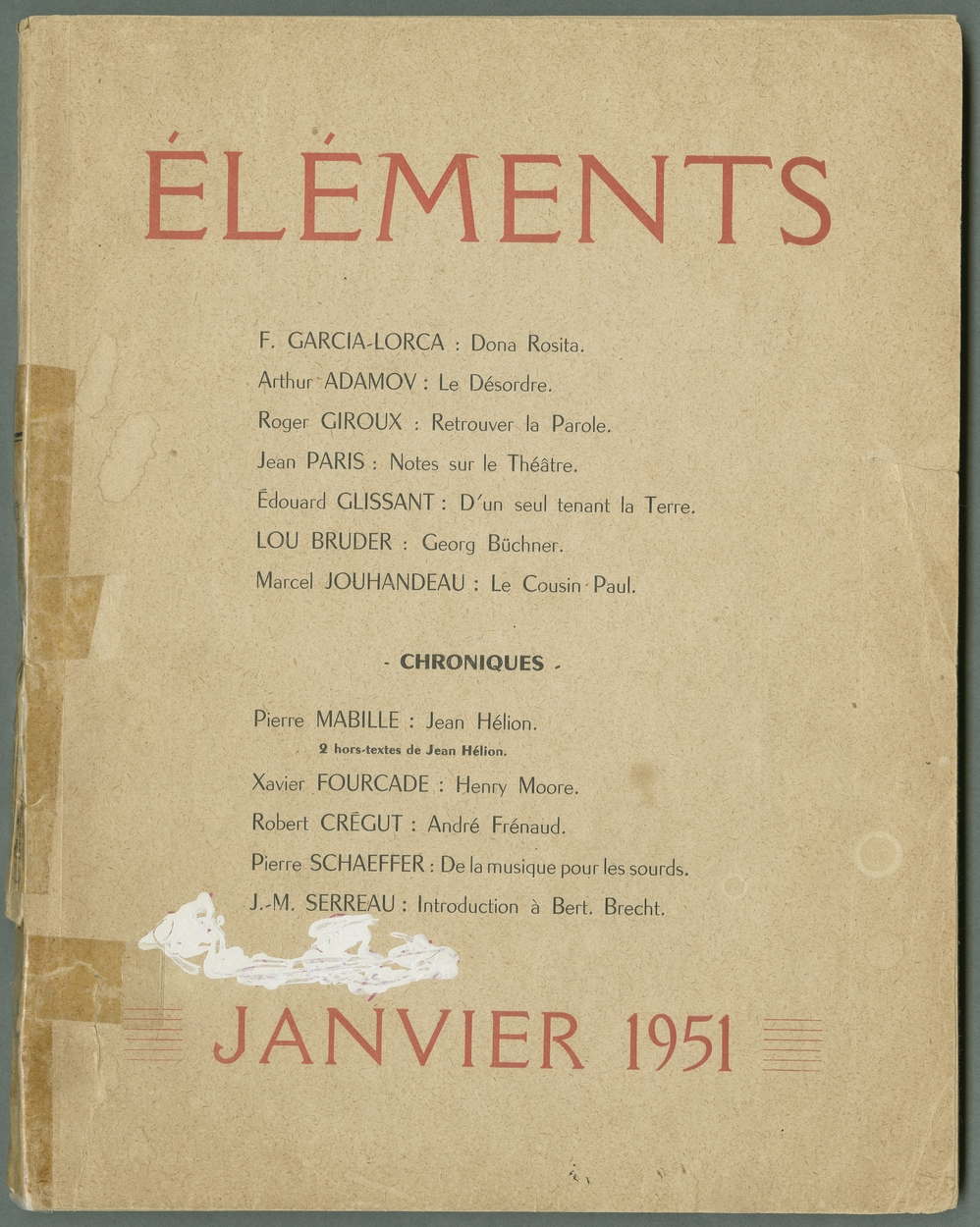 Revue "Elements" fondée par Maurice Roche